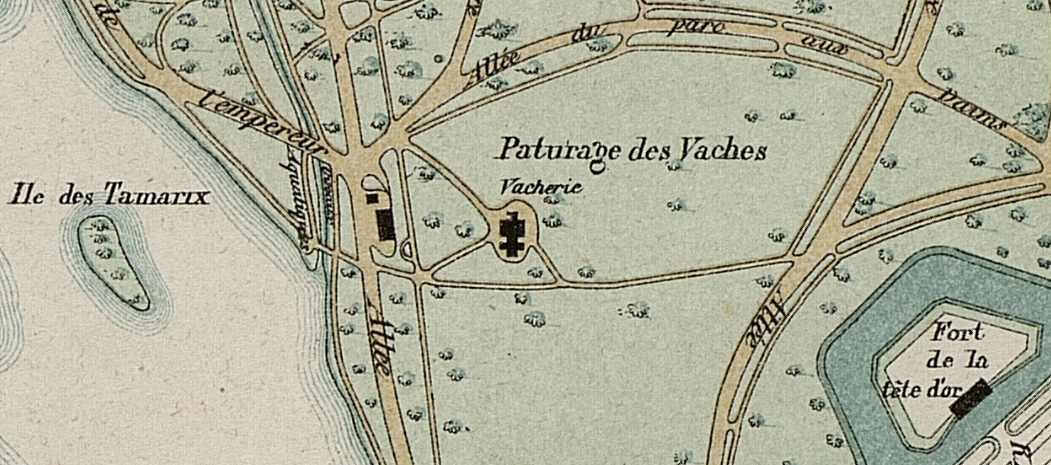 Le parc de la Tête d'Or à Lyon, plan de 1863.